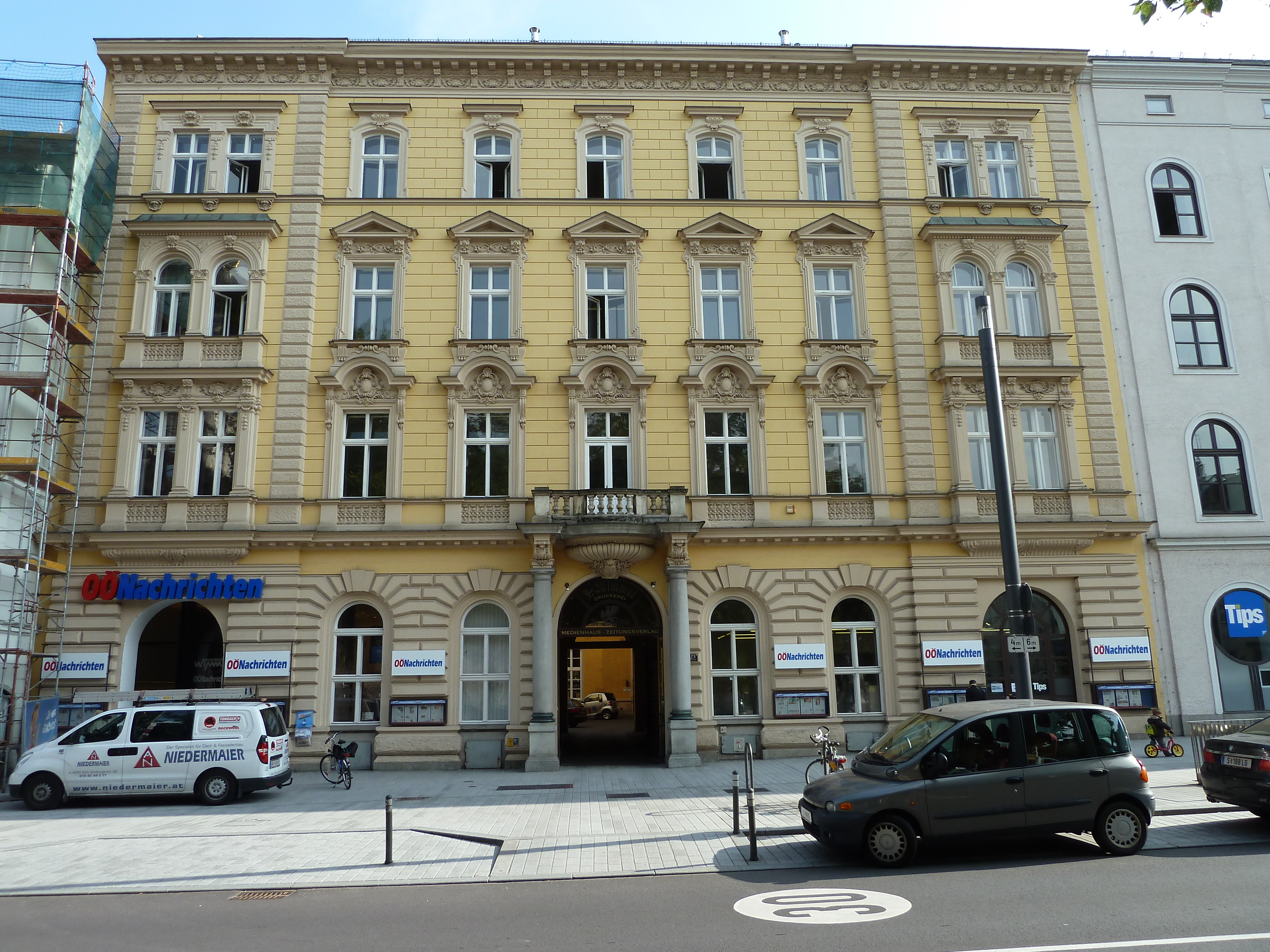 Bürgerhaus